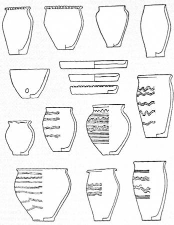 Гончарний і ліпний посуд райковецької культури